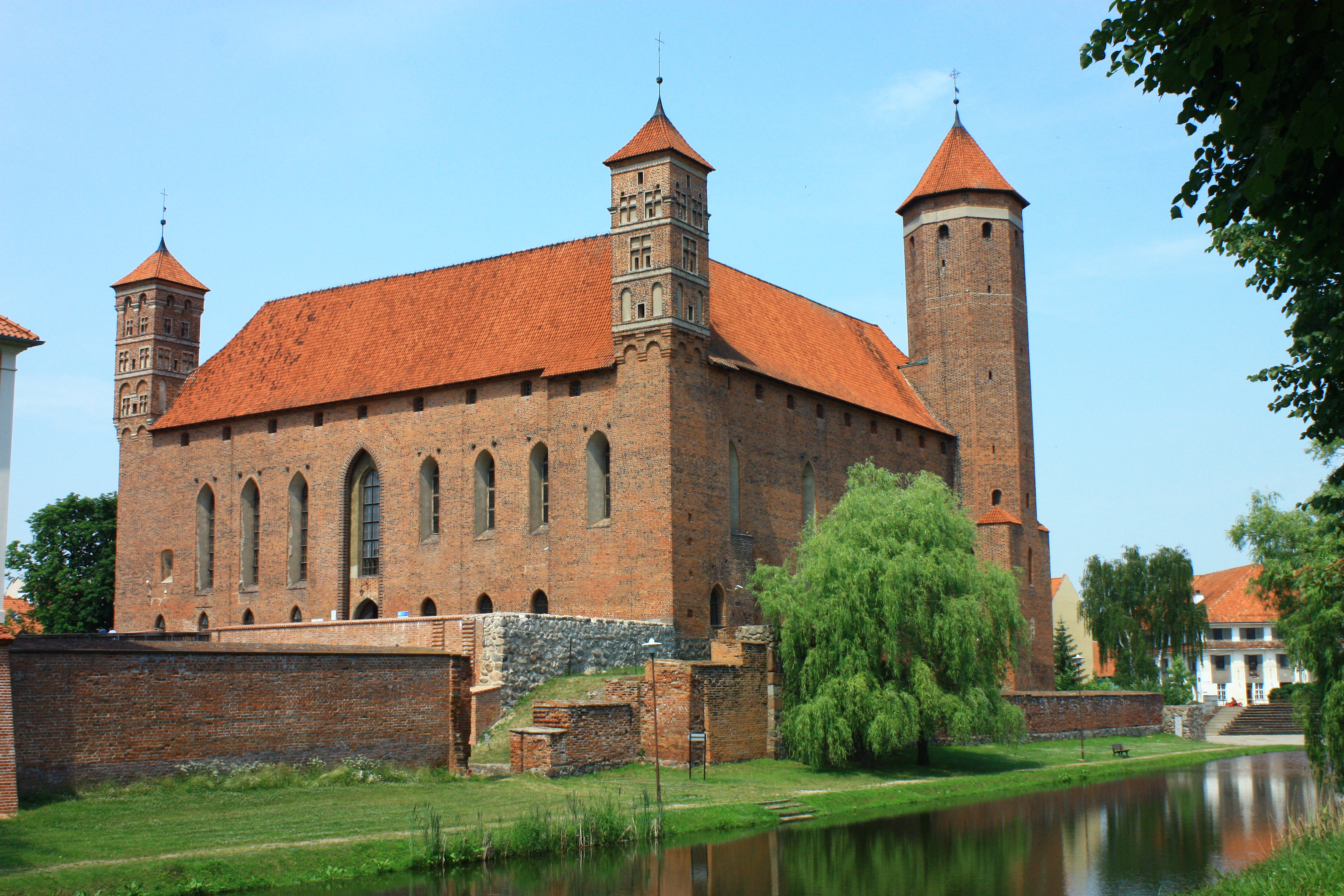 Lidzbark Warmiński, zamek biskupi, ob. muzeum, XIV, XIX